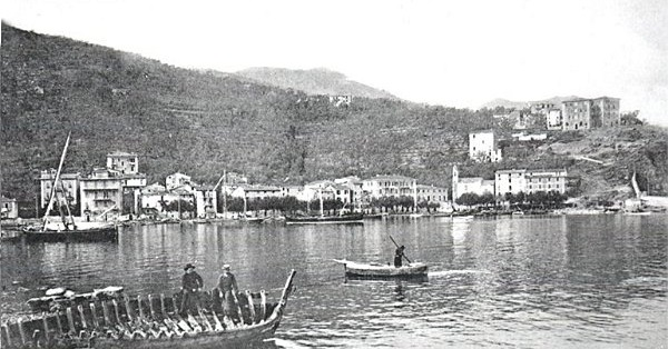 Veduta di Cadimare alla fine del secolo XIX